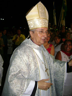 Dom Frei Severino Batista de França, OFM Cap.